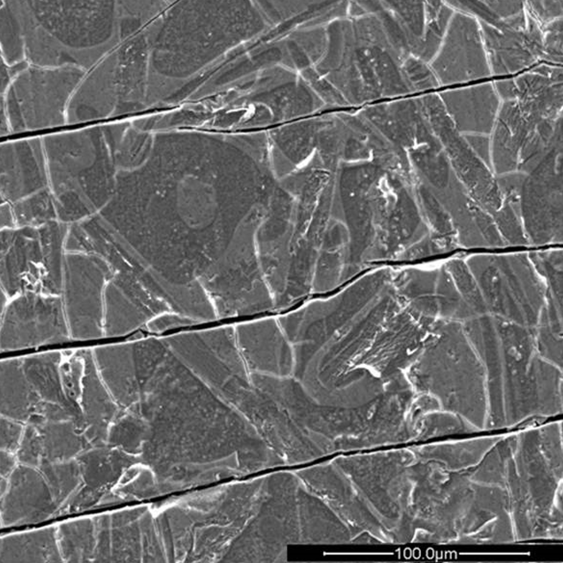 REM-Aufnahme einer Anodenfolie eines 1000µF/16V-Elkos aus einem ausgefallenem Kondensator. Das Aluminiumhydroxid hat alle Strukturen auf der Anode zugewuchert.